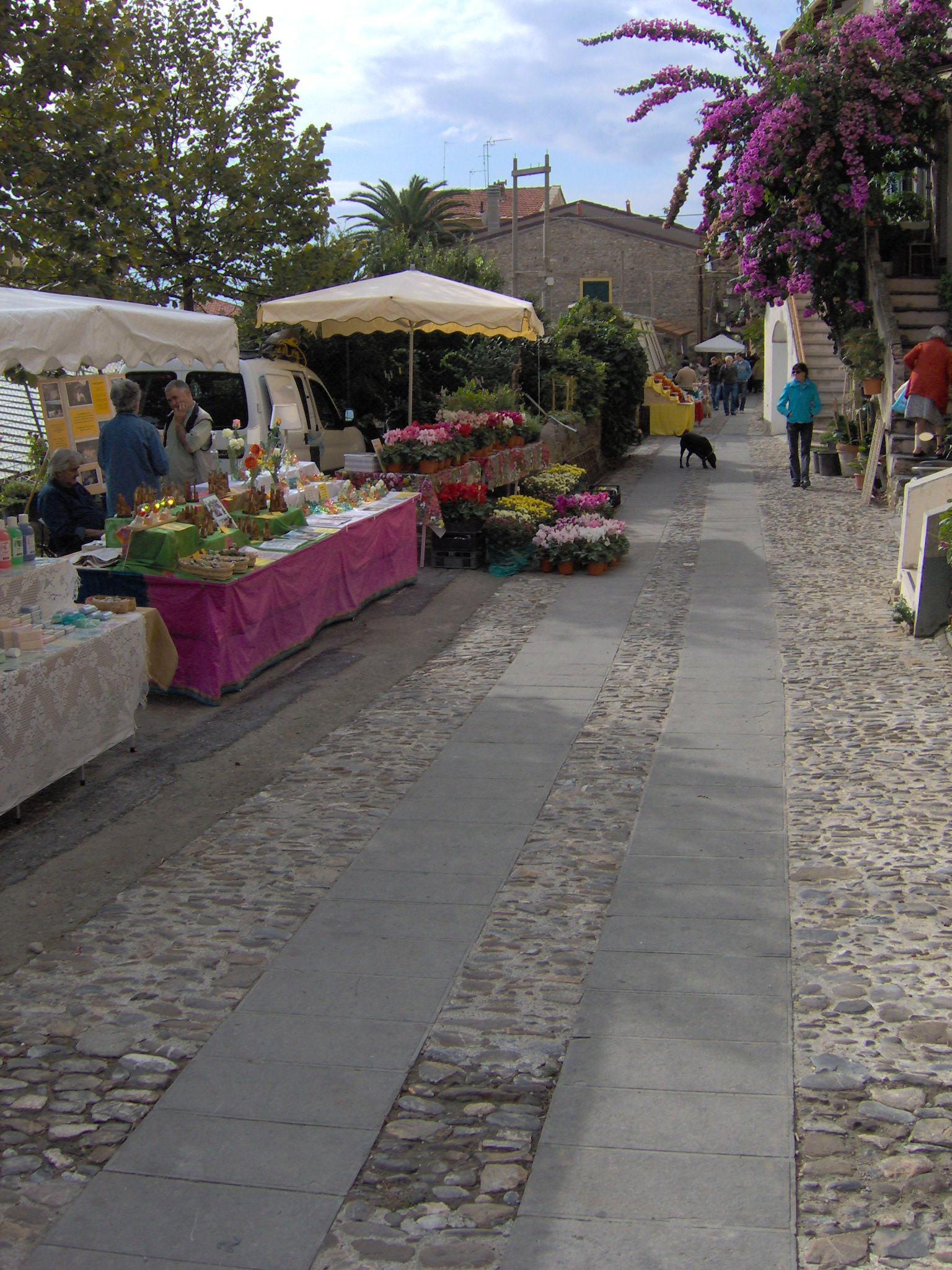 Particolare di Pompeiana durante la fiera di autunno del 2006